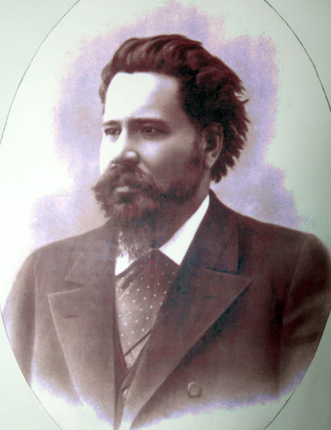 Володимир Підвисоцький - український патолог, ендокринолог, імунолог, мікробіолог.